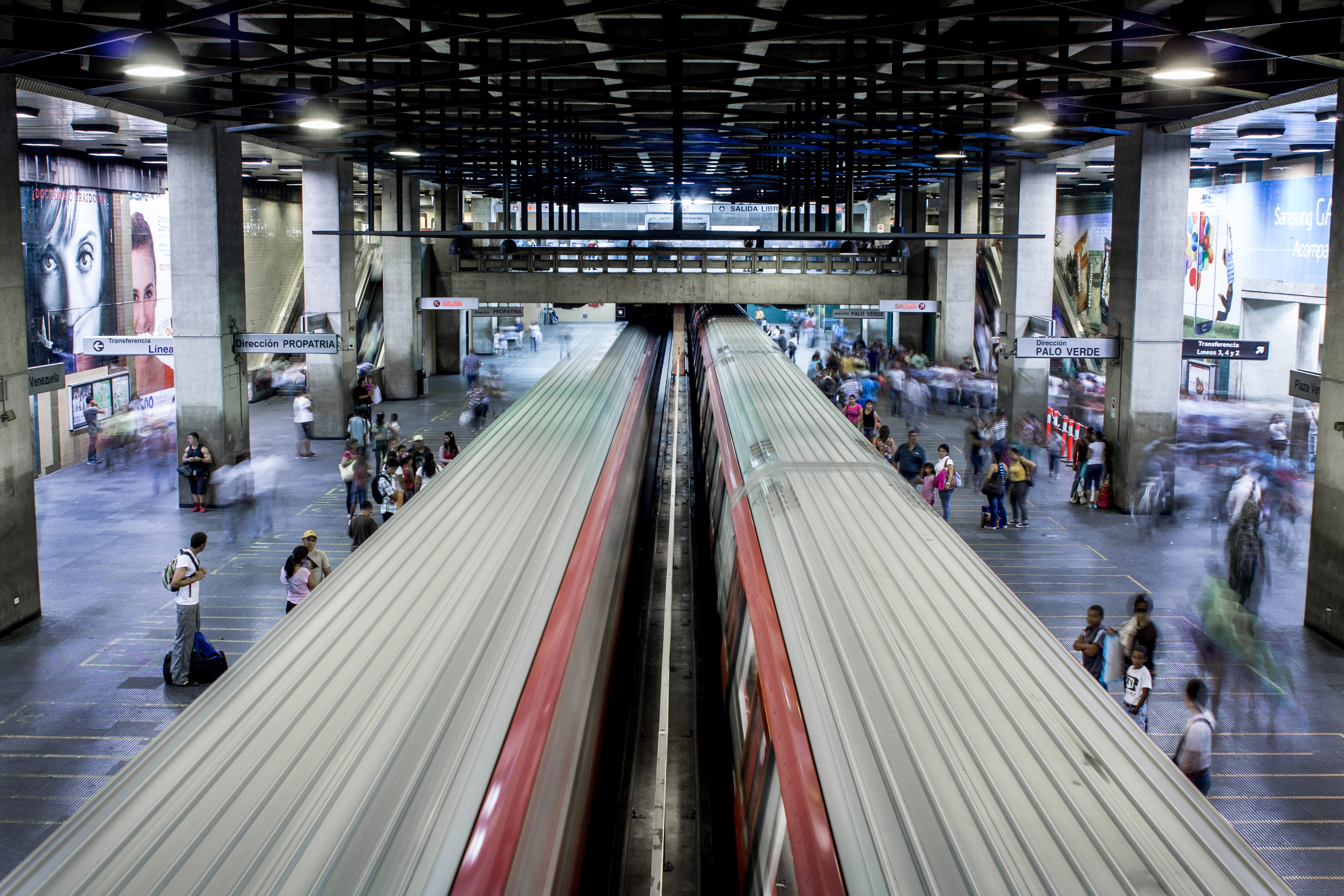 Caracas